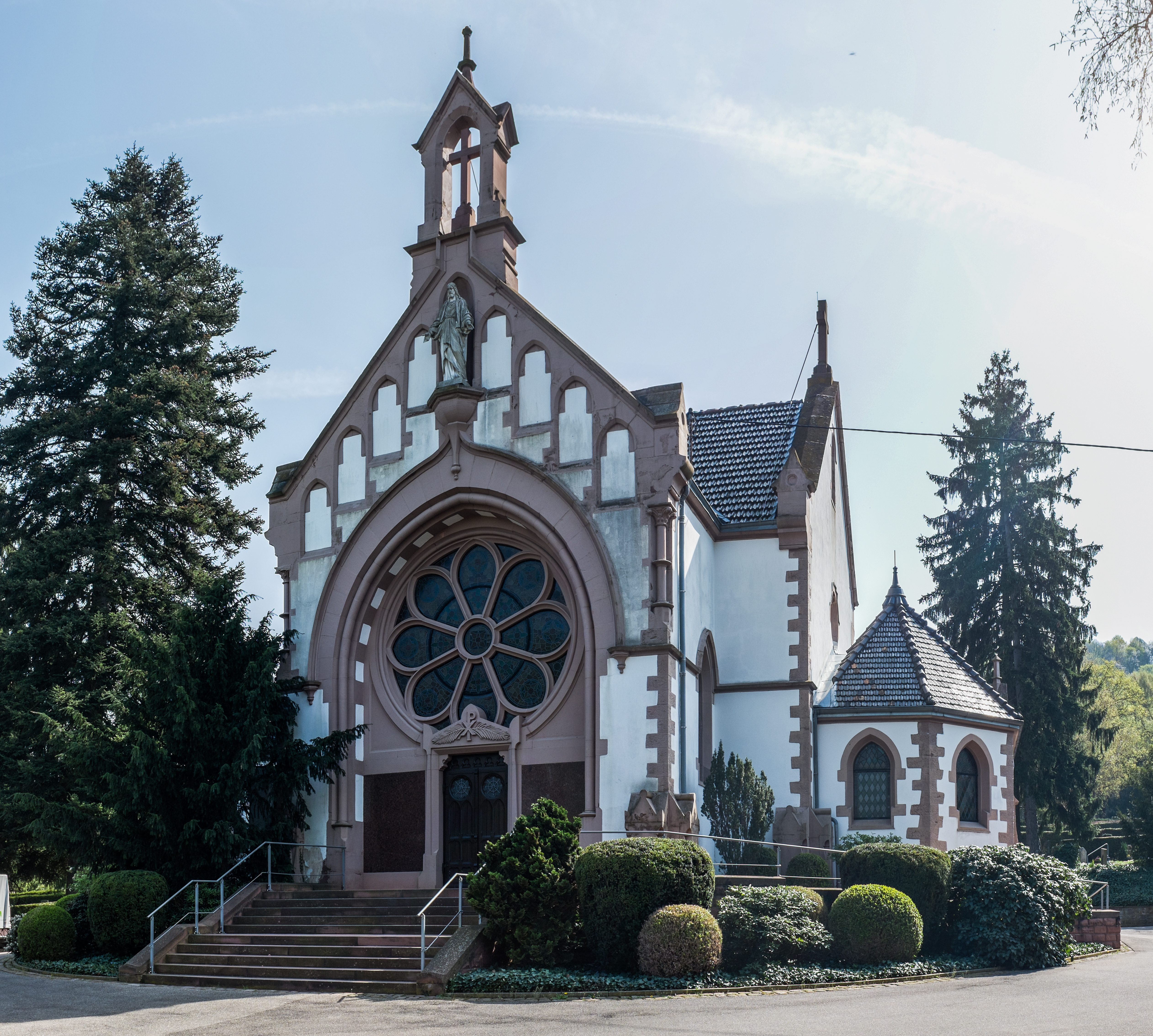 Bergfriedhof Durlach - Friedhofskapelle - Frontansicht